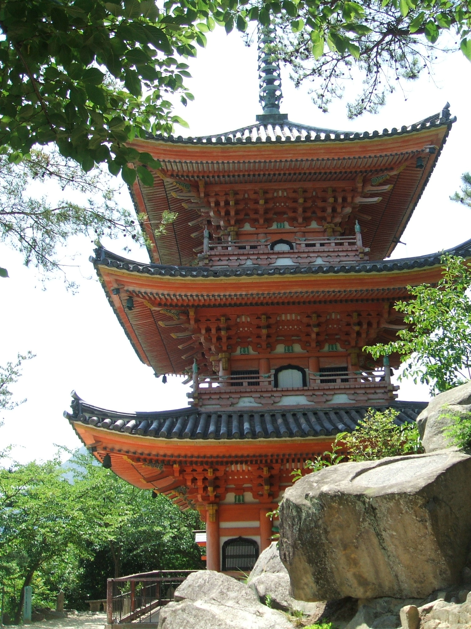 広島県尾道市瀬戸田町にある向上寺三重塔